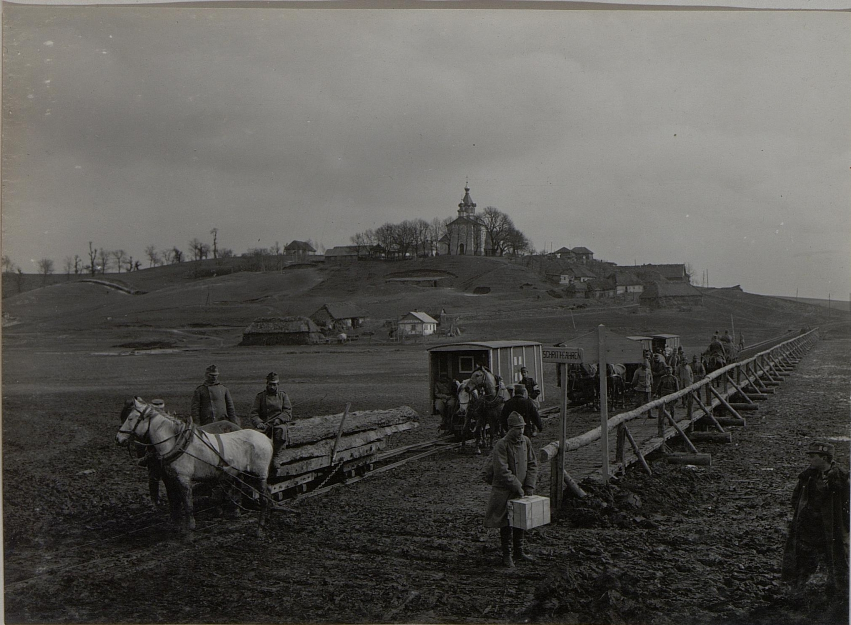 Die Feldbahn bei Milcza, Ankunft eines Krankentransportwagens